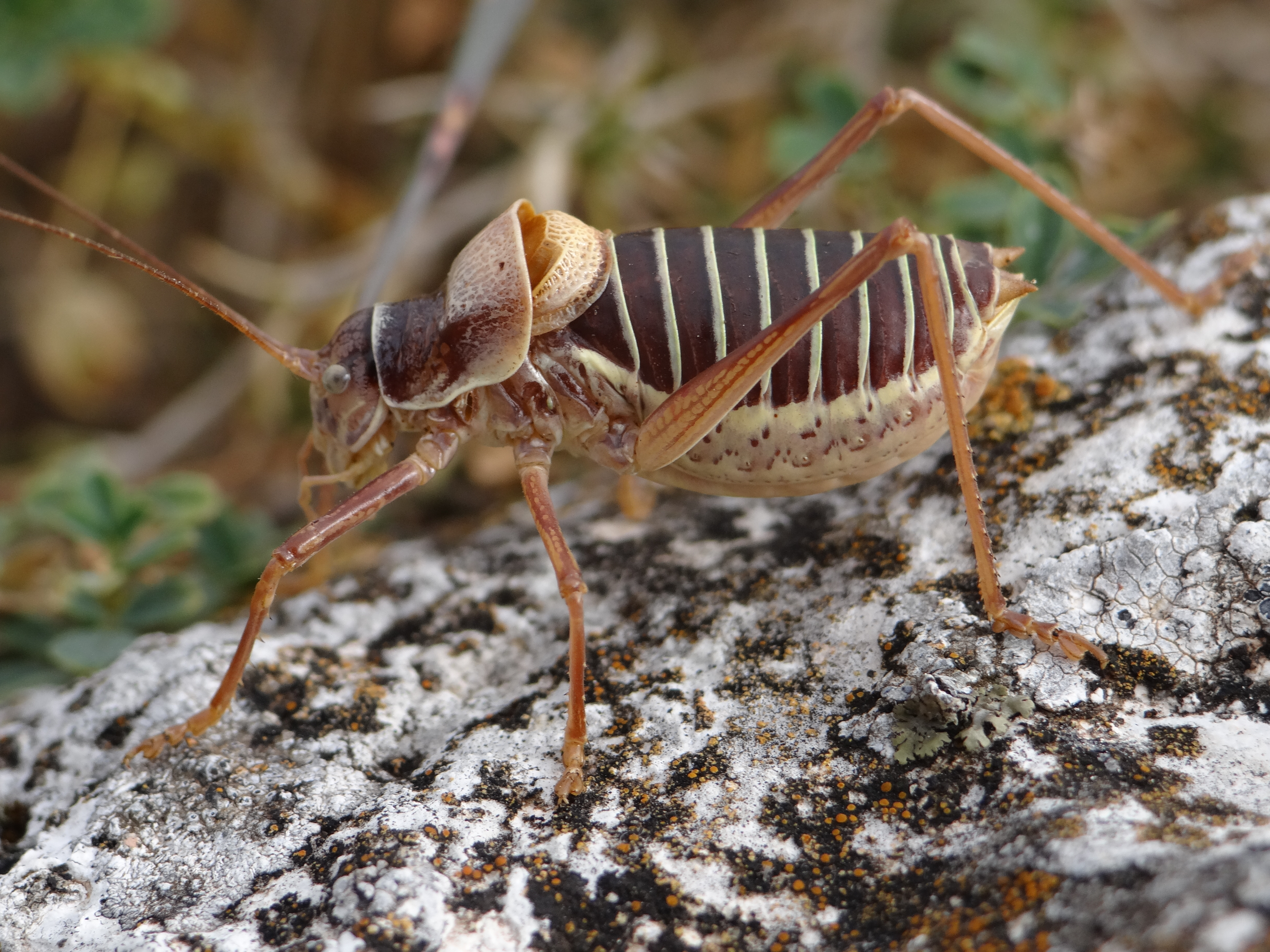 Éphippigère des vignes (Ephippiger ephippiger) - Causse Méjean